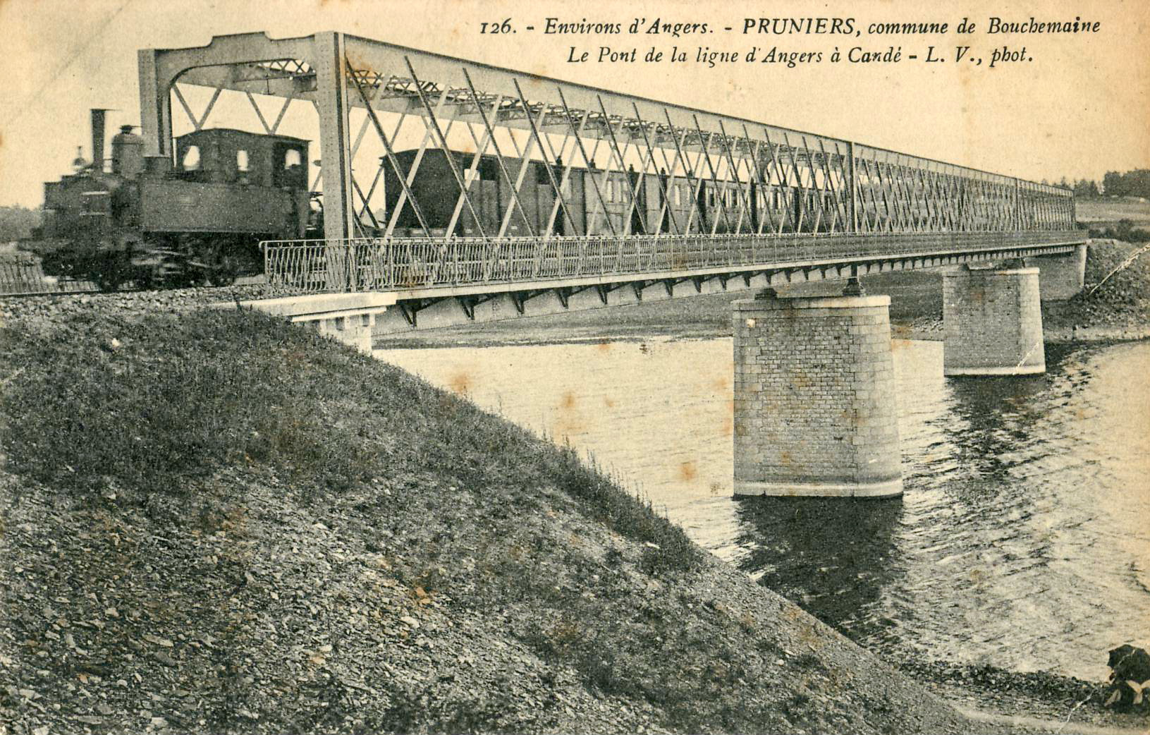 Carte postale ancienne éditée par L.V., phot., n°126 :PRUNIERS (Commune de Bouchemaine) - Le Pont de la ligne d'Angers à Candé